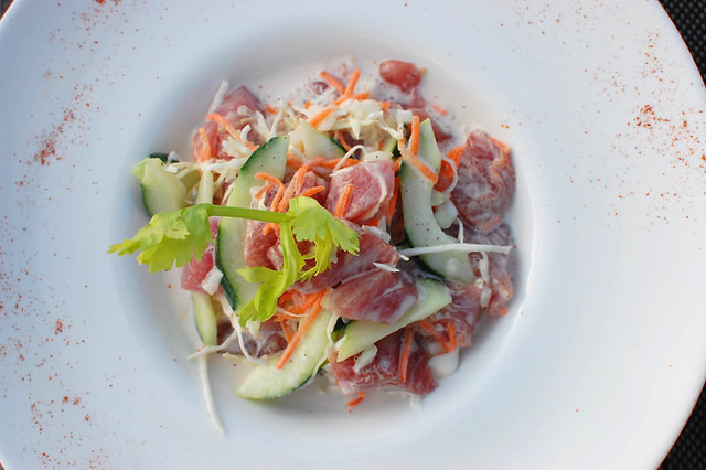 Plat typique de la Polynésie française